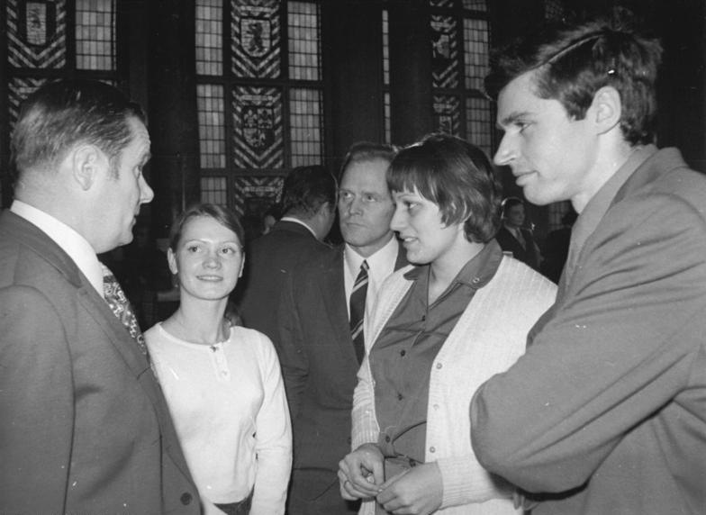 ADN-ZB-Koard-16.2.1973-pe-Berlin: Vorbereitung X. Festivalkomitee - Mitglieder des Nationalen Festivalkomitees der DDR für die X. Weltfestspiele sind DTSB-Präsident Manfred Ewald, Karin Janz, "Täve" Schur, Renate Stecher und Wolfgang Nordwig (v.l.n.r.). Sie nahmen am 16.2.73 an der 3. Tagung des Komitees im Berliner Roten Rathaus teil. (siehe ADN-Meldungen)."